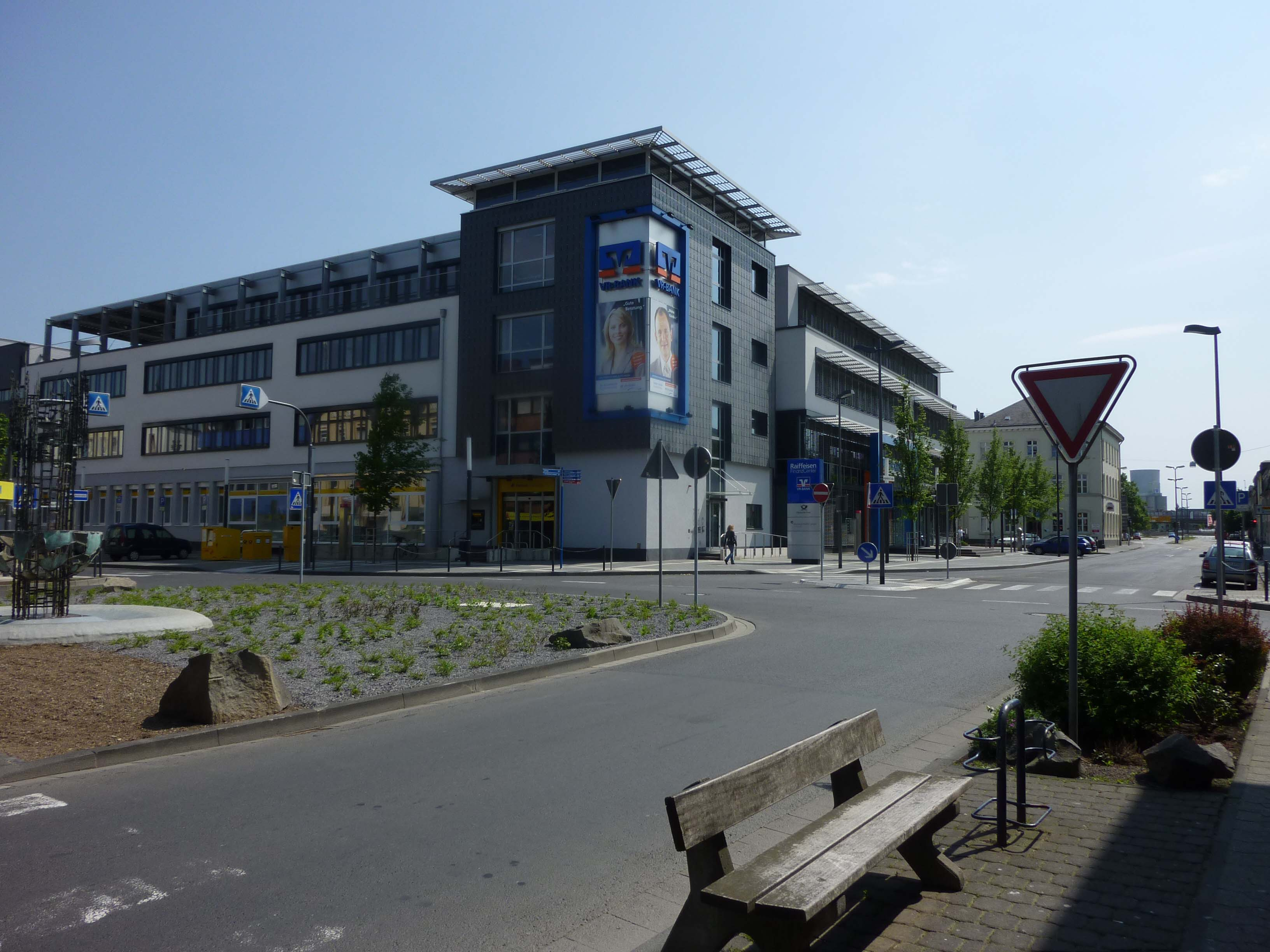 Finanzzentrum VR-Bank Neuwied-Linz